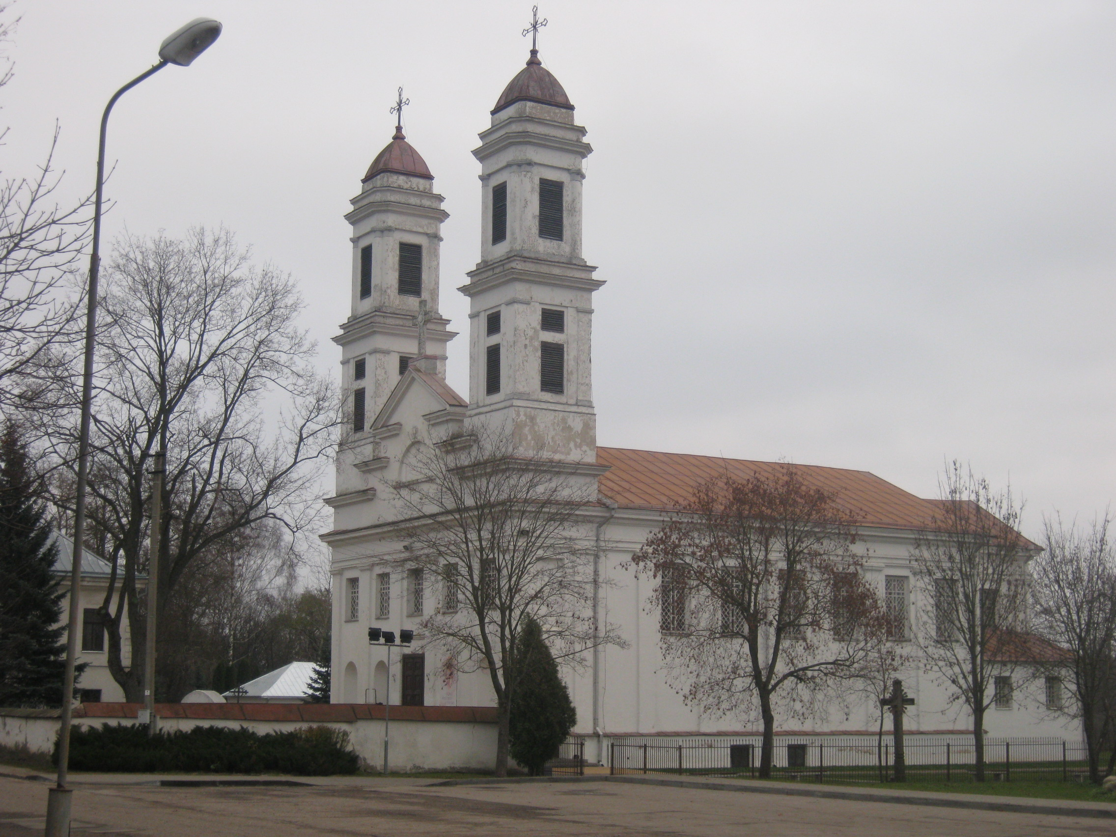 Jonava